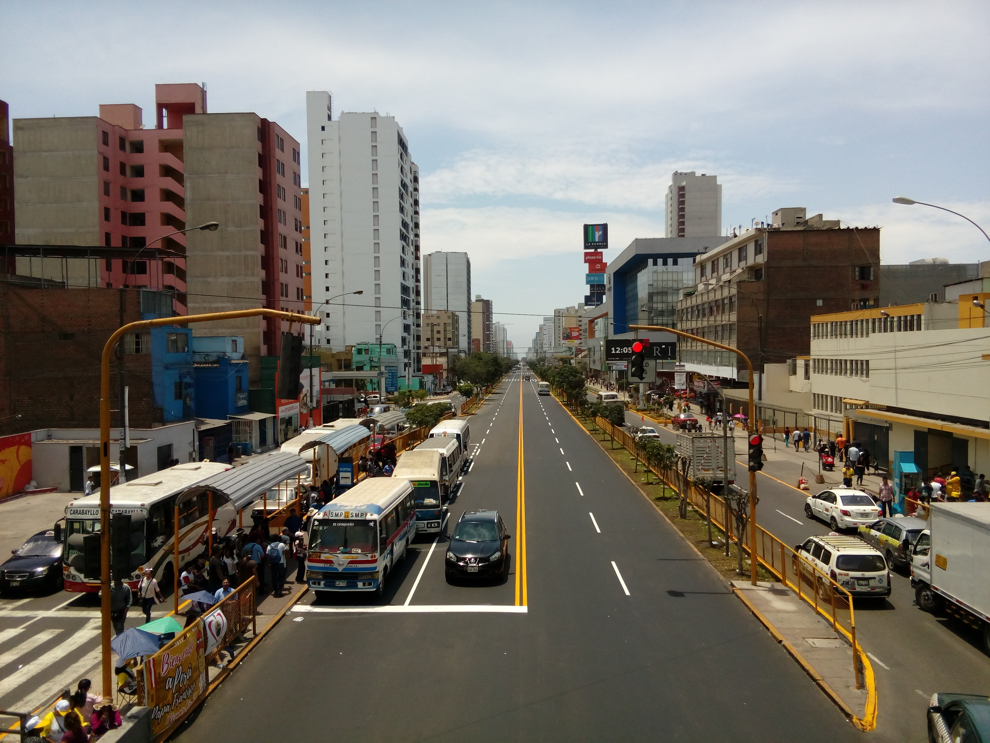 La Av. Brasil en la ciudad de Lima.